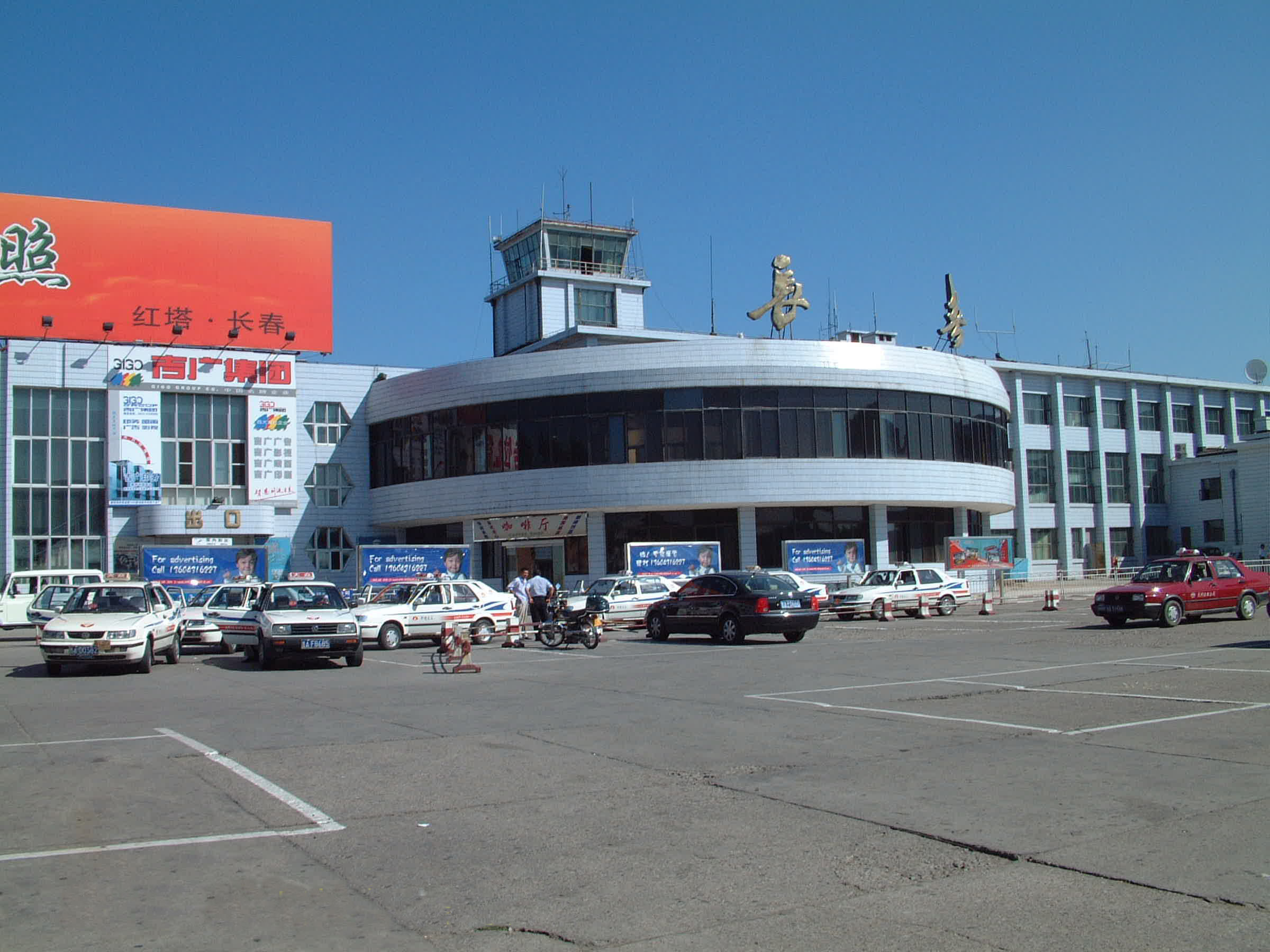 长春 大房身机场 Dafangshen Airport 2002